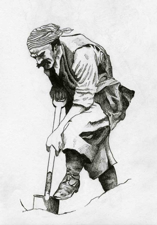 Pirate au bout de l'épuisement, sale même hideux.